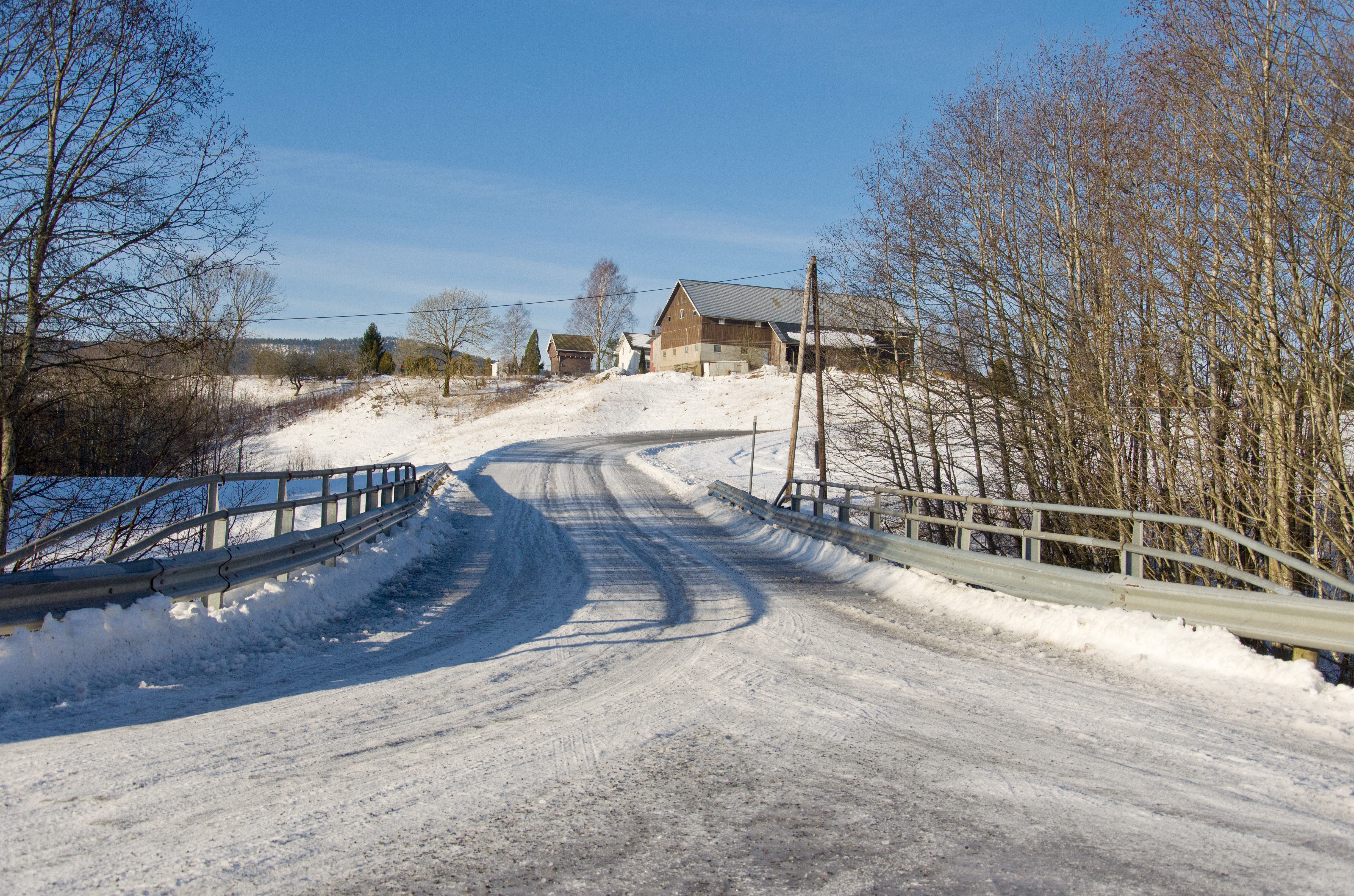 Fylkesvei 945 Lærumveien i Vestfold. Budderud bru.